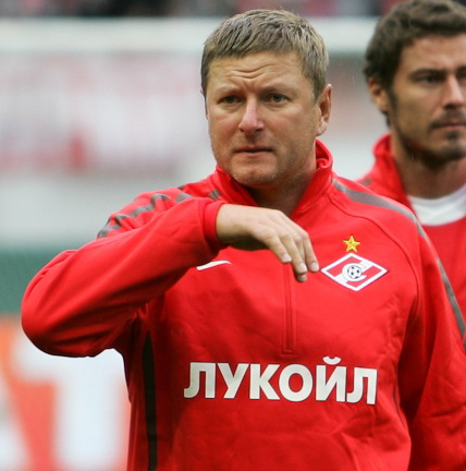 Евгений Кафельников